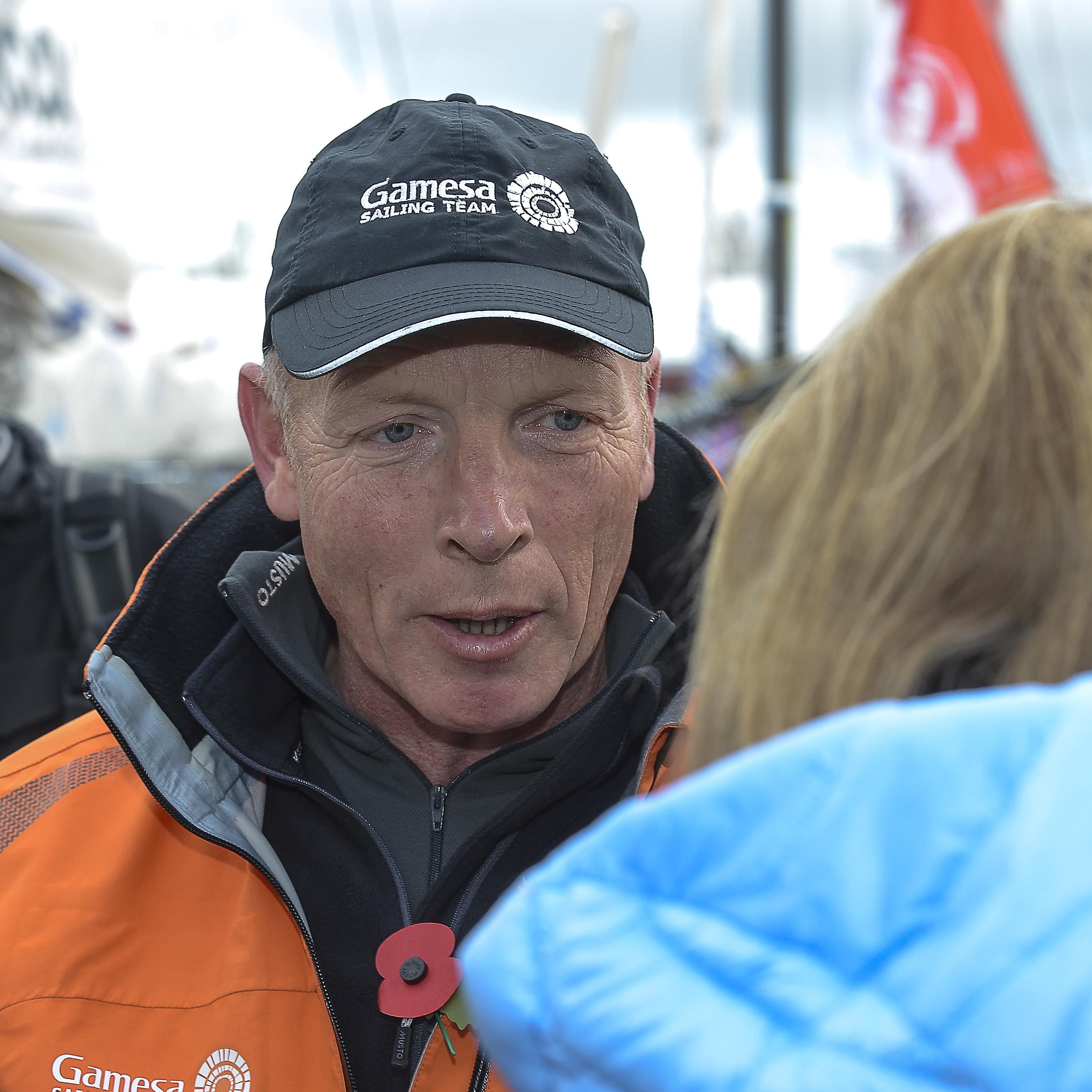 0178-Vendée 2012 (Ponton)